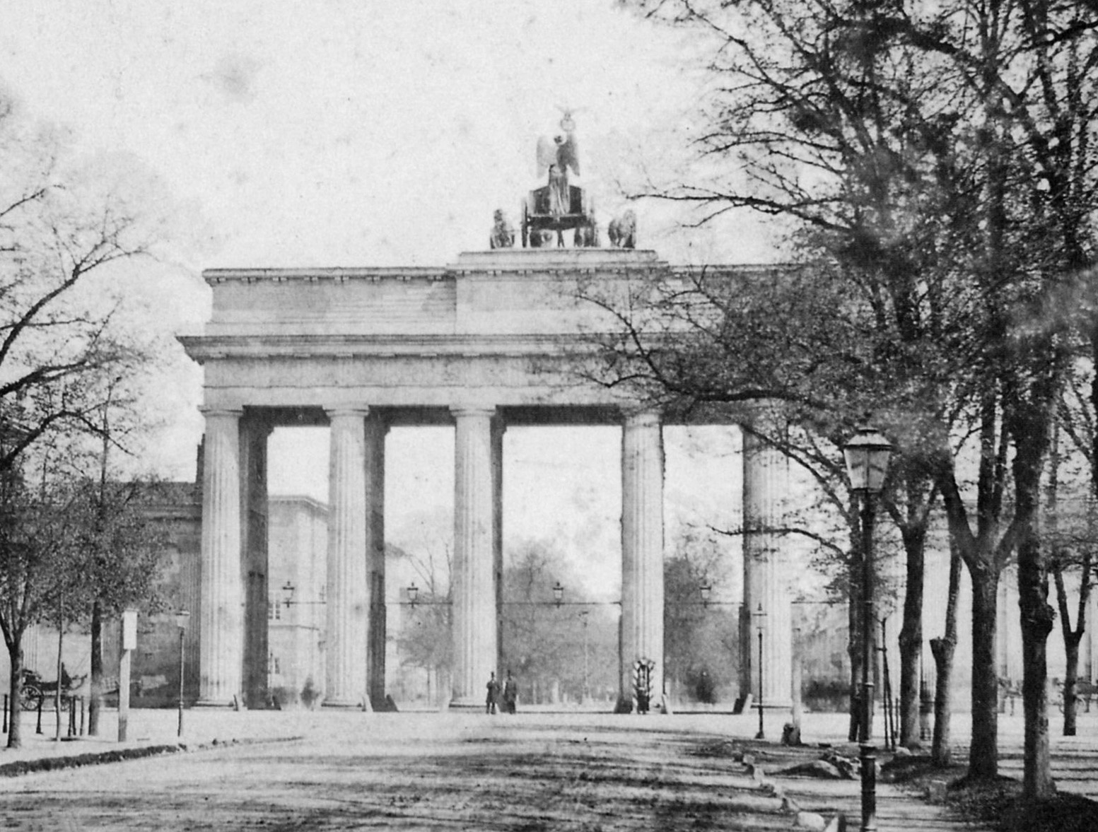 Brandenburger Tor von Westen gesehen, mit Gasbeleuchting in den Durchgängen und Wachposten an der mittleren Durchfahrt.